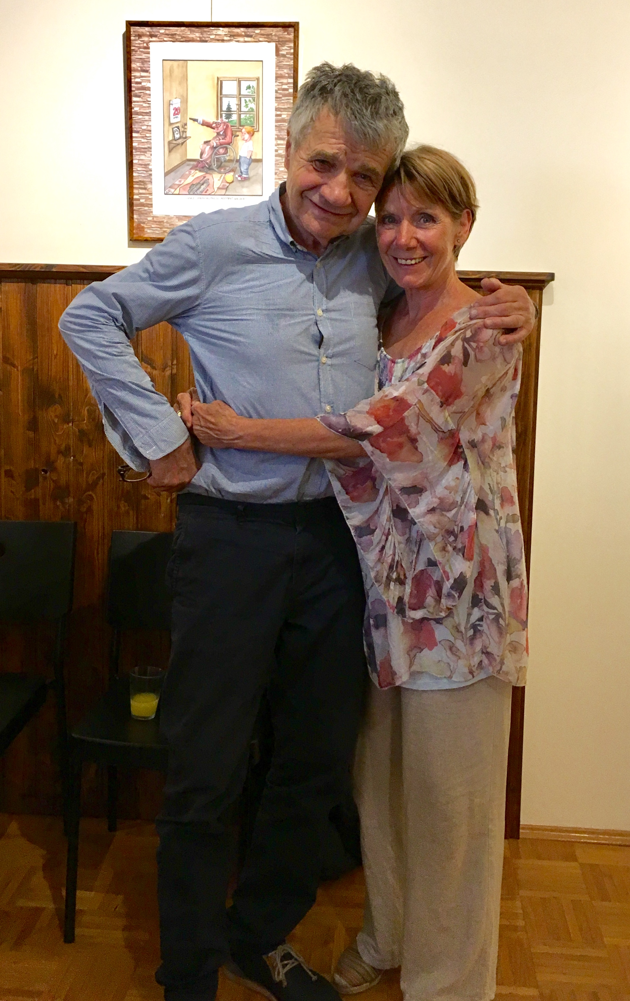 Vernissage Itze Grünzweig im Stadtmuseum Klosterneuburg 2018 - (Erika Deutinger, Klaus Rott am 21.6.2018)